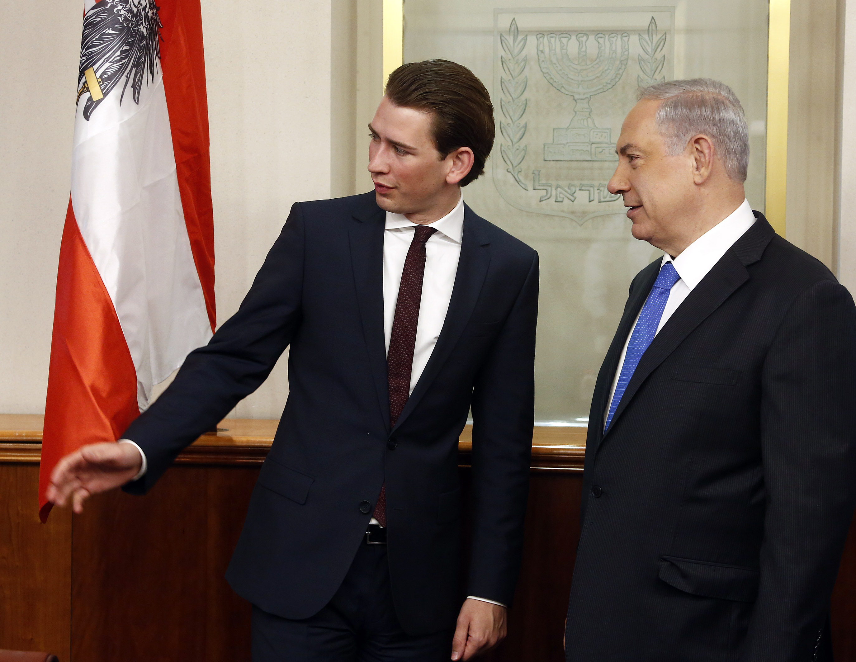 Arbeitsbesuch Israel. Außenminister Sebastian Kurz trifft den israelischen Ministerpräsident Benjamin Netanjahu. Jerusalem. 23.04.2014, Foto: Dragan Tatic